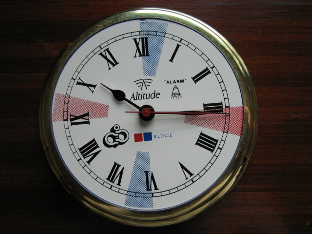 Montre de station radiotélégraphique internationale. La montre marque l'heure en Temps Universel Coordonné. comme référence. Montre de station radiotélégraphique avec : En rouge les périodes de silence radio de 3 minutes sur la fréquence 500 kHz. Dans le monde, depuis 1999. Les émissions doivent cesser dans la bande comprise entre 495 kHz à 505 kHz durant la période de silence radio. Dans quelques pays appliquant toujours l'ancienne recommandation, les émissions doivent cesser dans une bande comprise entre 490 kHz à 510 kHz durant la période de silence radio. Sur la fréquence 500 kHz, les stations effectuent un silence radio de h + 15 à h + 18 et de h + 45 à h + 48. L’appel de routine, de sécurité et d’urgence est autorisé aux heures de h + 18 à h + 44 et de h + 48 à h + 14 avec un dégagement sur une fréquence de travail. Les radiocommunications pour la détresse sont libres sur la fréquence 500 kHz. En bleu les périodes de silence radio de 3 minutes sur les fréquences: 2174,5 kHz , 2182 kHz et 2187,5 kHz. L'appel de routine, de sécurité, d'urgence est autorisé entre l'heure h + 03 à h + 29 et entre h + 33 à h + 59. Les radiocommunications pour la détresse sont libres.